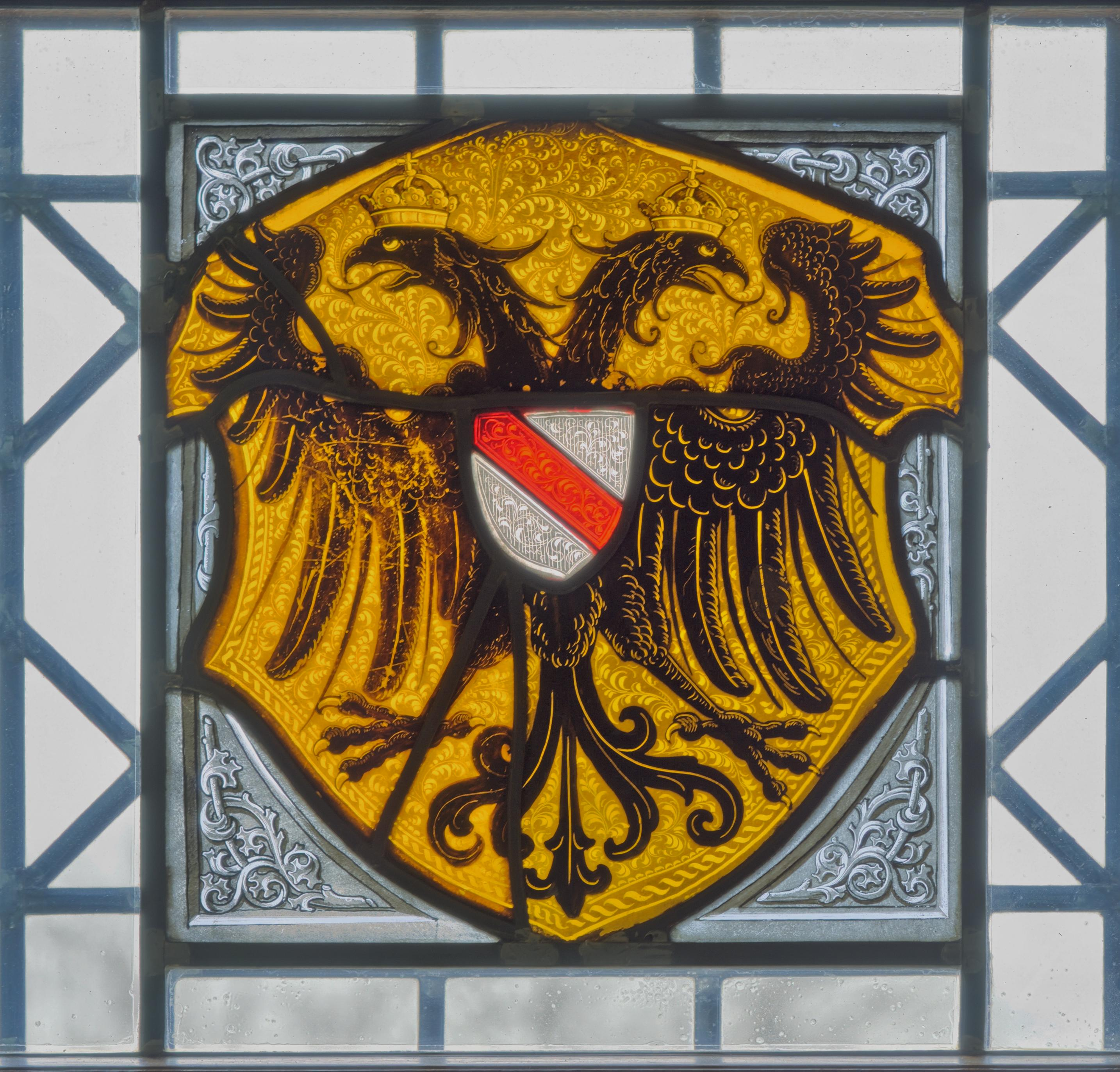 Vorderösterreicheischer Doppeladler, da Staufen bis 1805 dazu gehörte